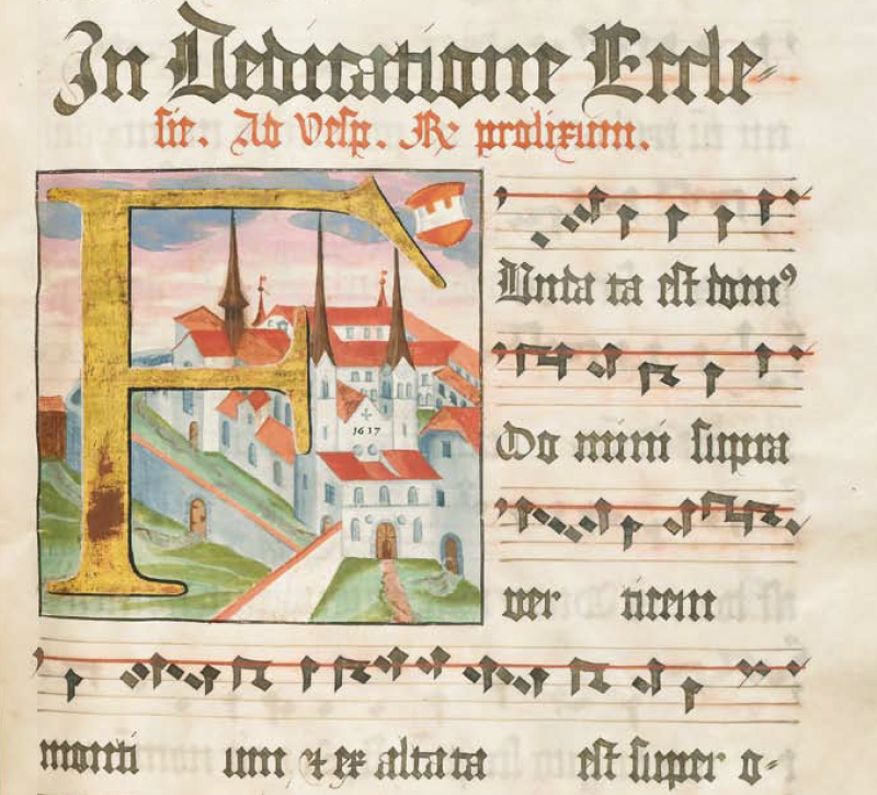 Ansicht des Klosters Muri aus dem Jahr 1617, abgebildet in einem Antiphonar aus dem Jahr 1617.